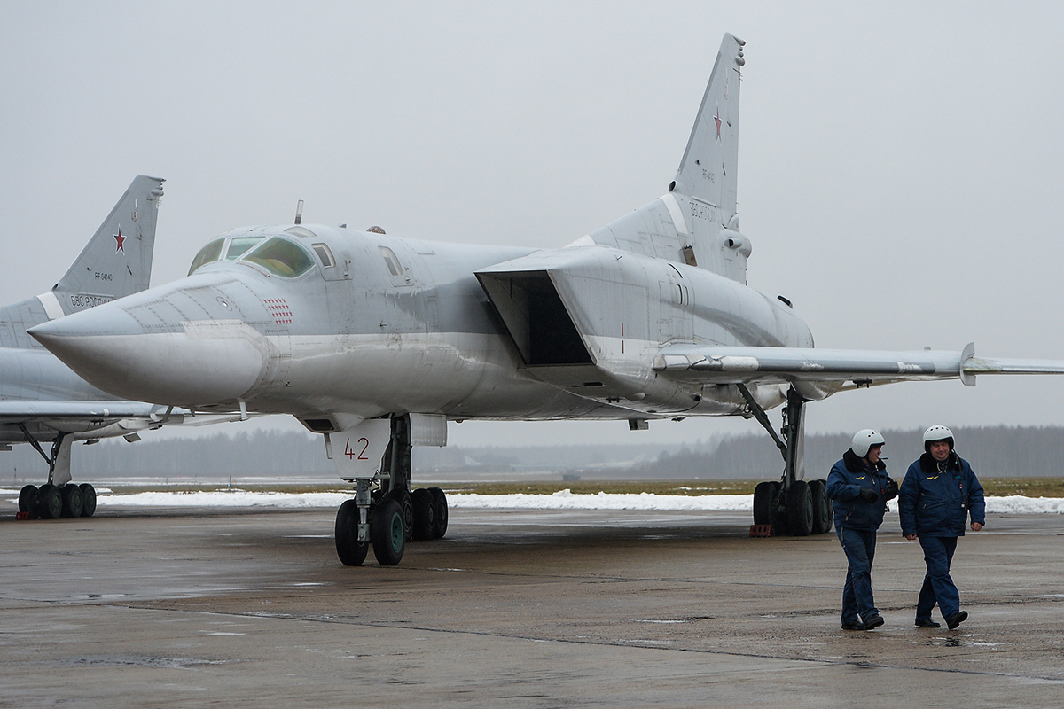 Возвращение самолётов дальней авиации ВКС России на аэродромы базирования (Калужская область, аэродром Шайковка).